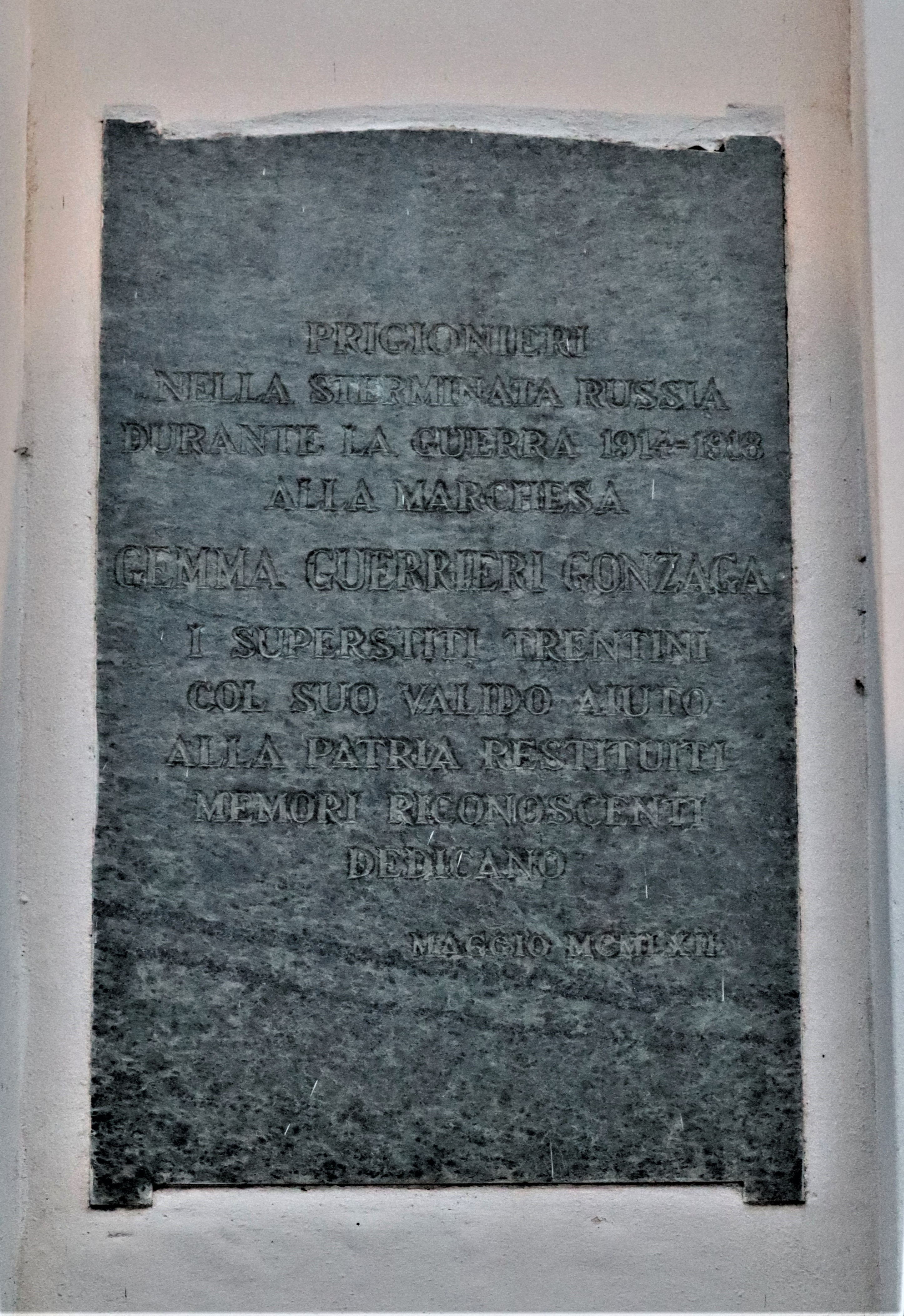 chiesa di San Leonardo in Sarnis, Borghetto sull'Adige, Lapide sulla facciata.